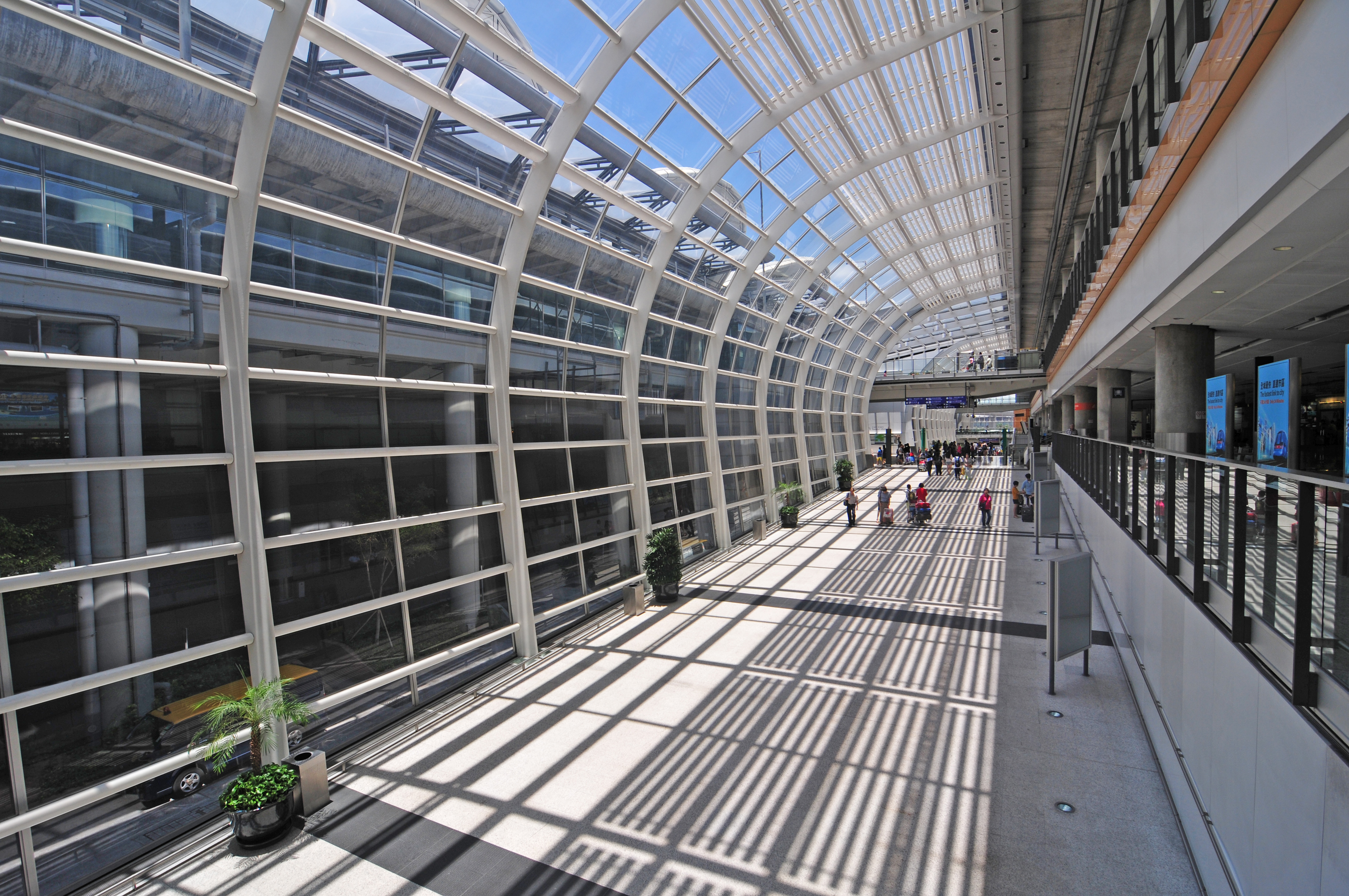 Wikimania 2013 Hongkong